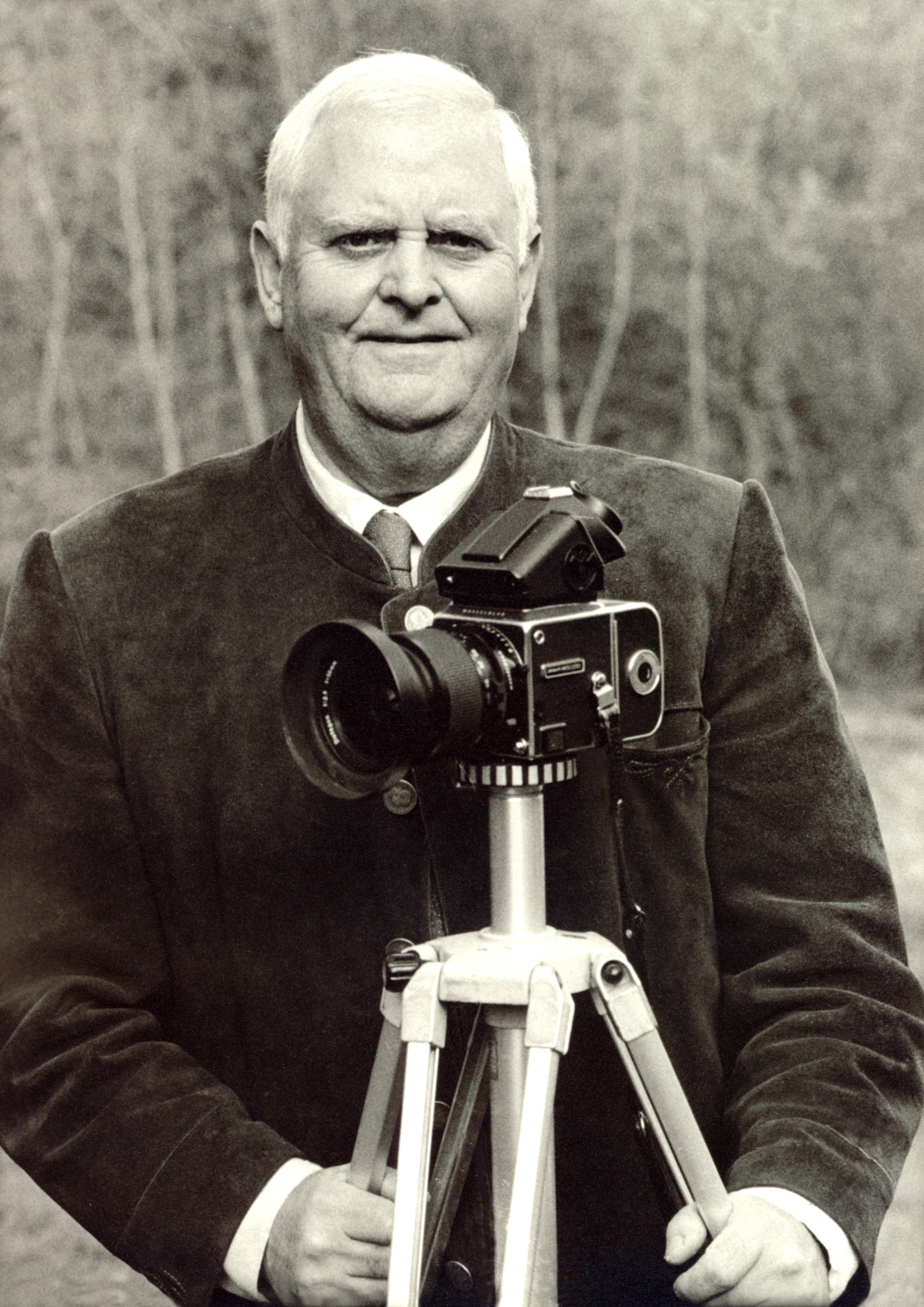 Herr Ackermann hinter der Kamera.